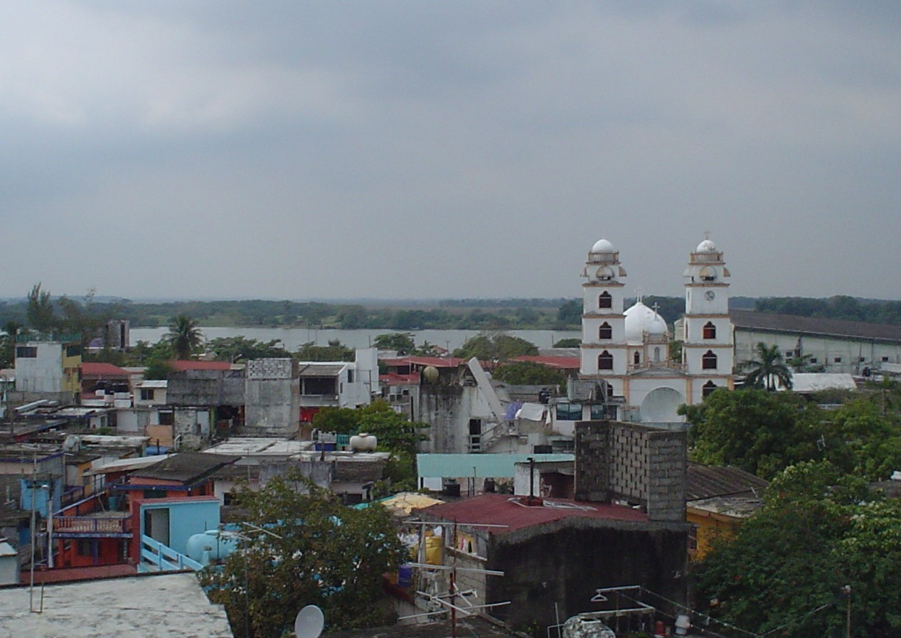 Centro de Nanchital, Nanchital de Lázaro Cárdenas del Río